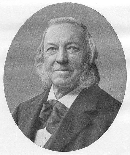 Hermann Bonitz (1814–1888), österreichischer klassischer Philologe. Originalfotografie aus dem Besitz von Johannes Vahlen.